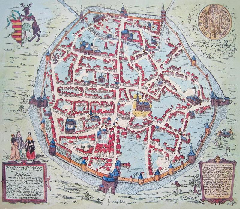 Foto van bewerking door Marcel Grondelings van origineel in Archief Hasselt